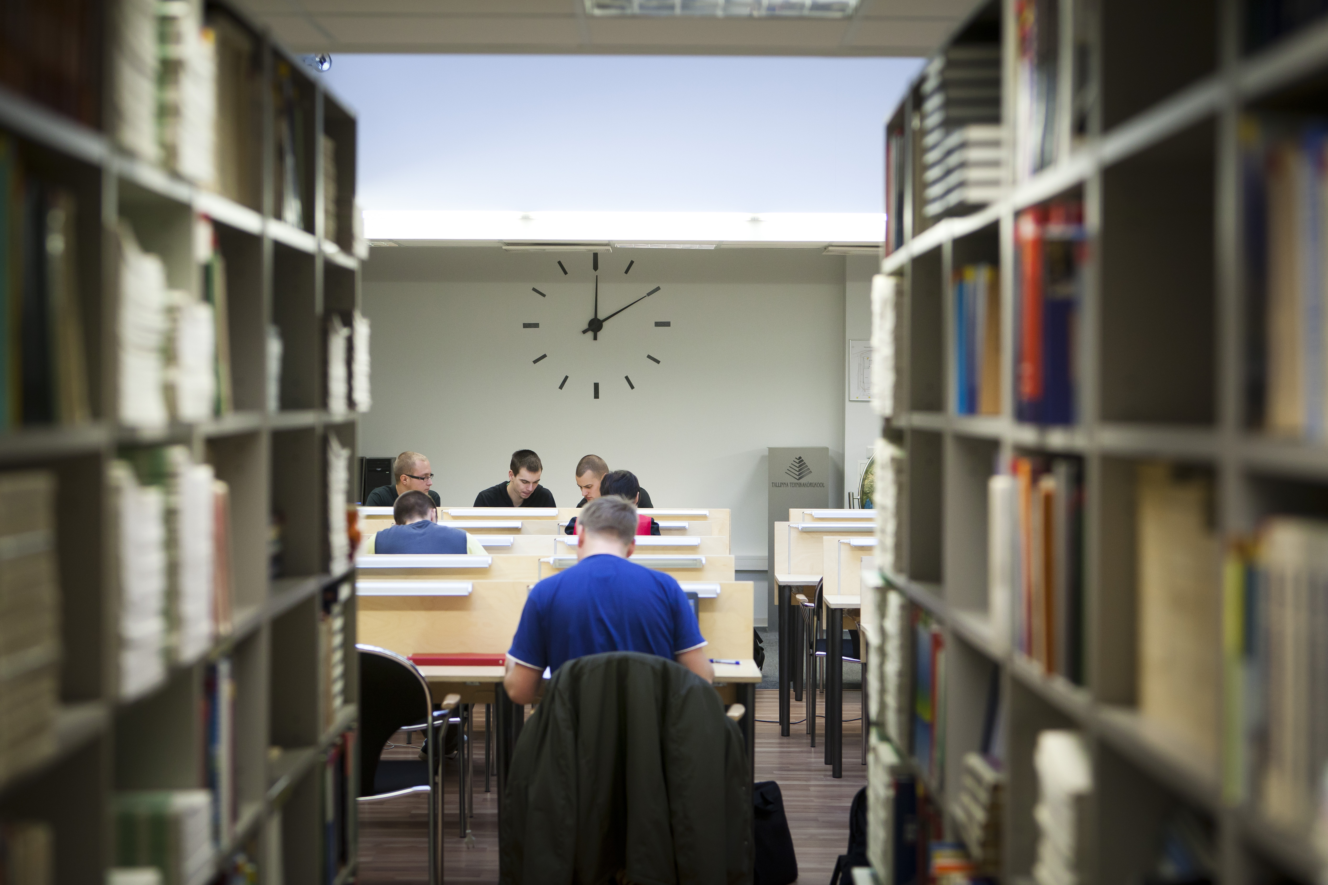 Tallinna Tehnikakõrgkooli raamatukogu